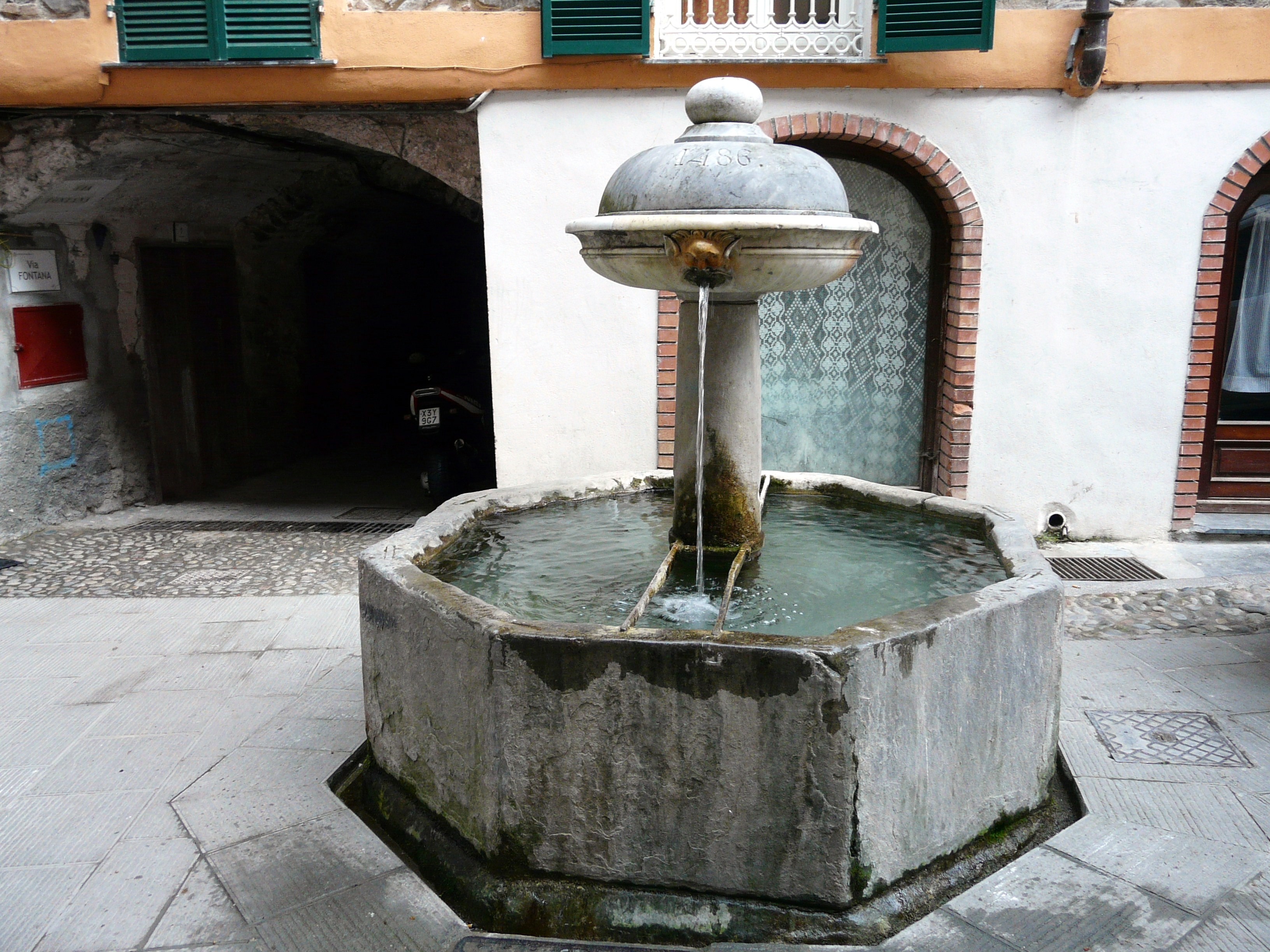 Centro storico di Isolabona, Liguria, Italia